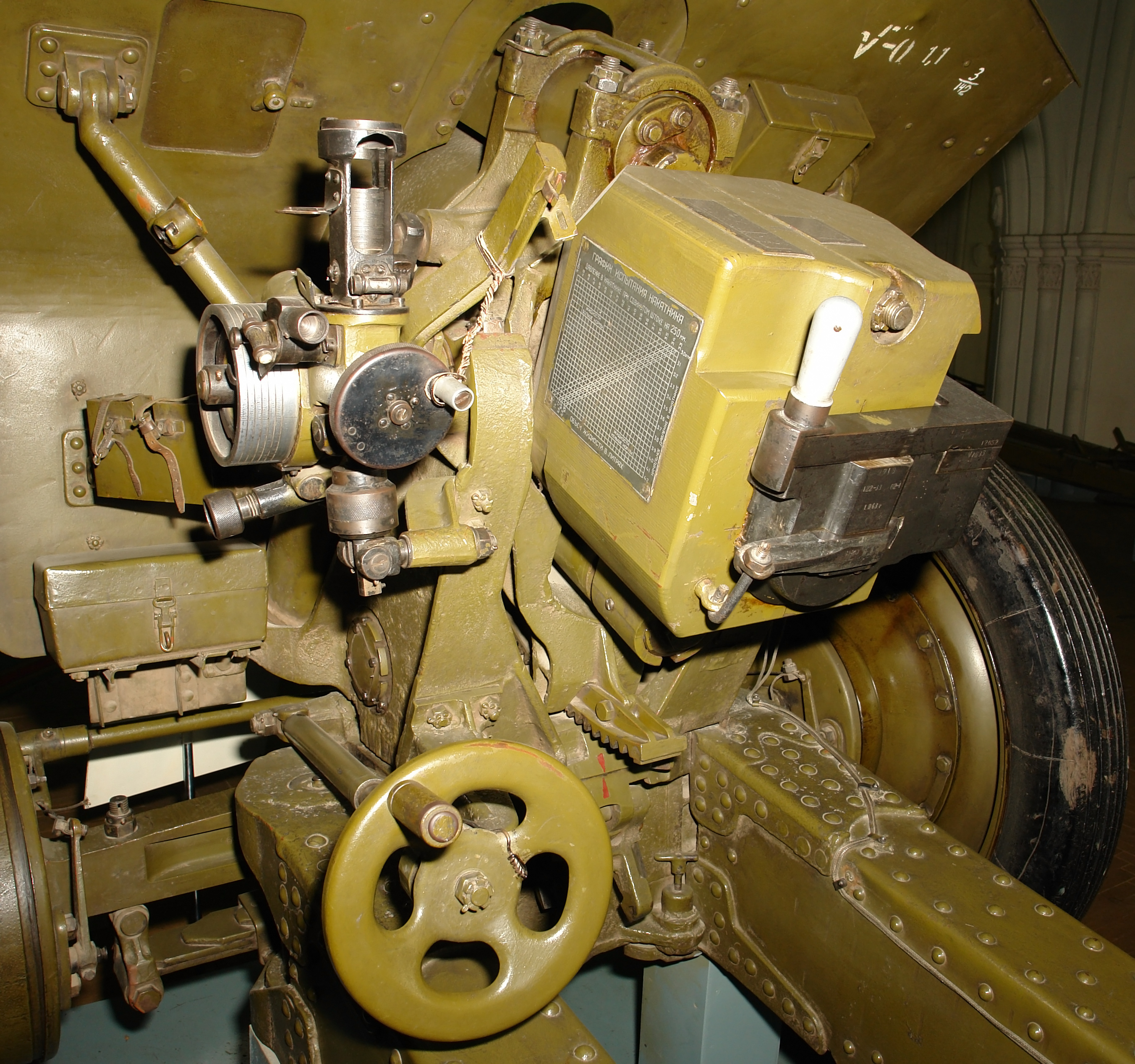 122-мм ГАУБИЦА обр. 1938 г. № 12671. Воины-патриоты 5-й батареи 162-го артиллерийского полка одними из первых на Ленинградском фронте внесли свои сбережения в фонд обороны Родины и попросили изготовить для них четыре орудия. 23 февраля 1944 г., в день 26-й годовщины Советской Армии, в районе г. Нарвы четыре орудия, в том числе и гаубица № 12671, вместе с поздравительной телеграммой Верховного Главнокомандующего были вручены патриотам-артиллеристам. В этот день батарейцы капитана М. М. Лободзинского дали из этих гаубиц первый залп по врагу. До конца войны из гаубиц было выпущено 8000 снарядов, уничтожено сотни гитлеровцев, 10 орудий, 8 минометных батарей, 25 пулеметов, 15 автомашин, разрушено 13 дзотов. Военно-исторический музей артиллерии, инженерных войск и войск связи, Санкт-Петербруг.